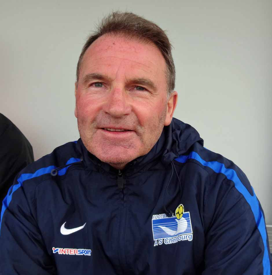 Denis Goavec, footballeur et entraîneur de football français